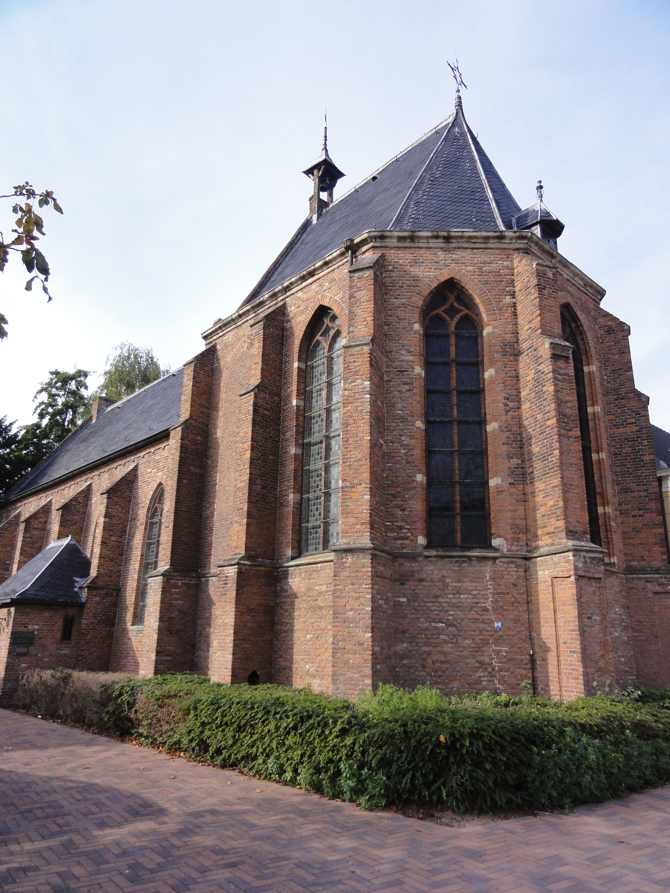 Tiel Rijksmonument 35577 Caeciliakapel Kerkstraat 34 84″ N, 5° 26′ 07.4″ E